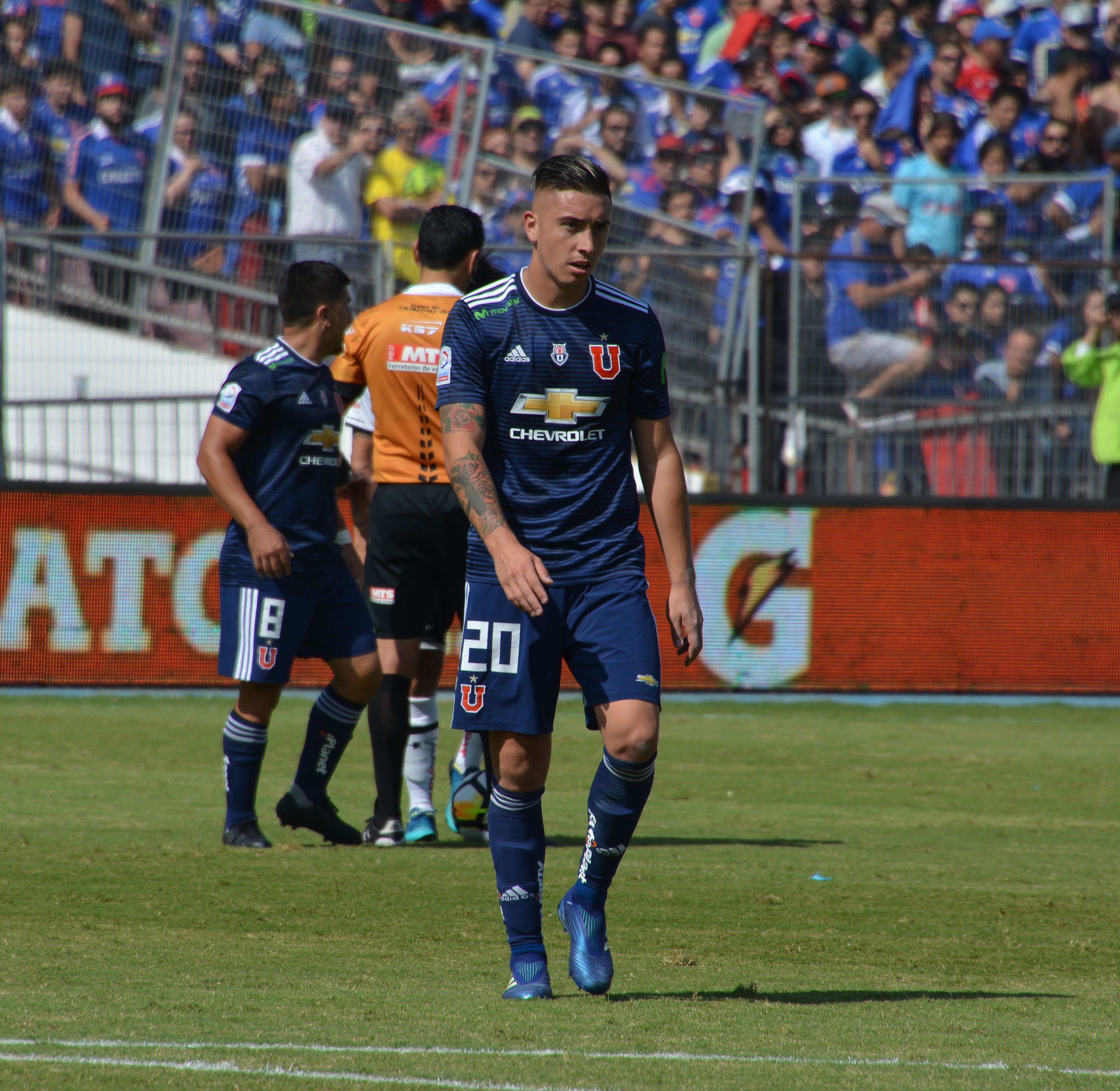 Universidad de Chile v Colo-Colo, Estadio Nacional, Santiago, Chile.